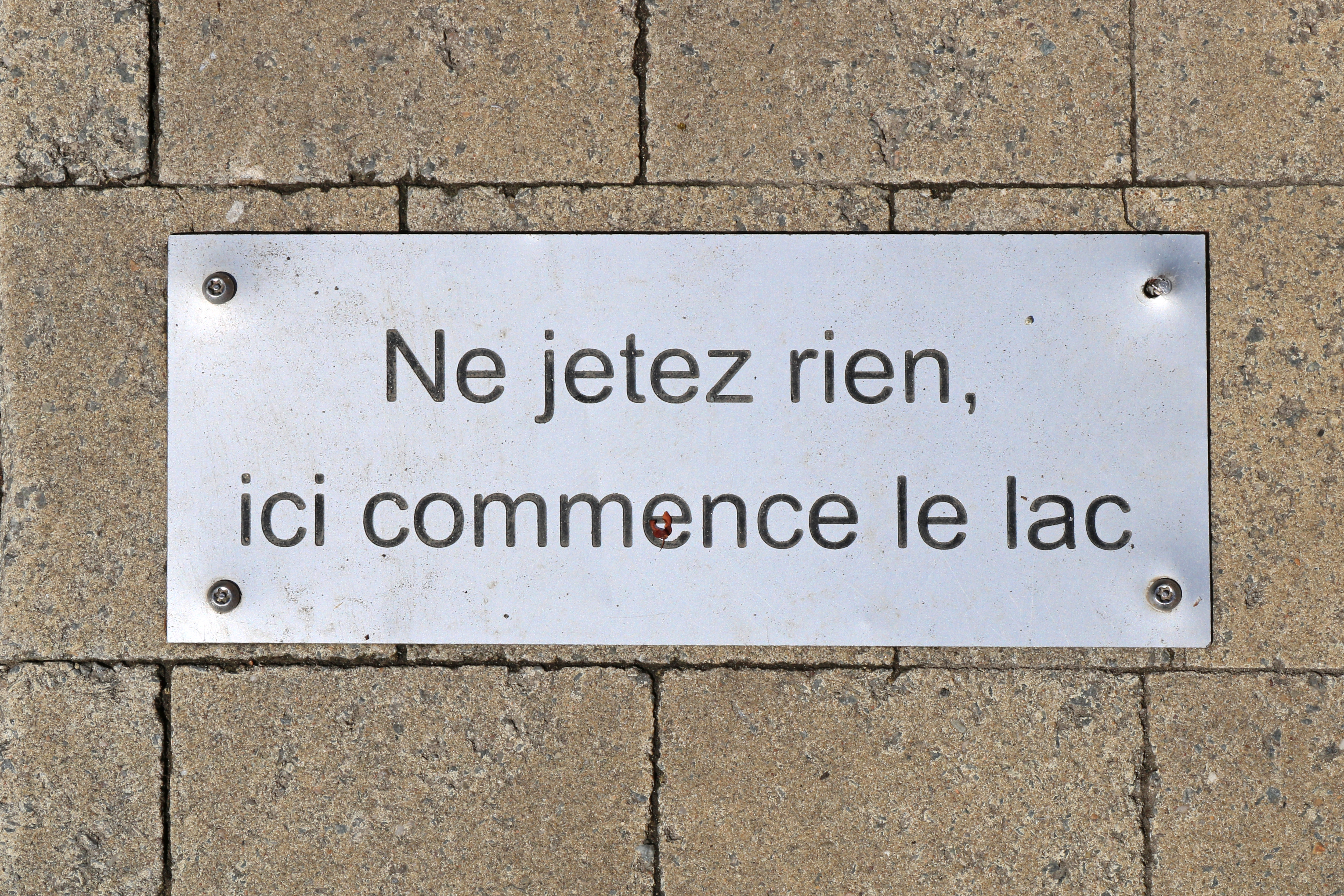 Belgique - Brabant wallon - Ottignies-Louvain-la-Neuve - plaque « Ne jetez rien, ici commence le lac » dans une rue de Louvain-la-Neuve